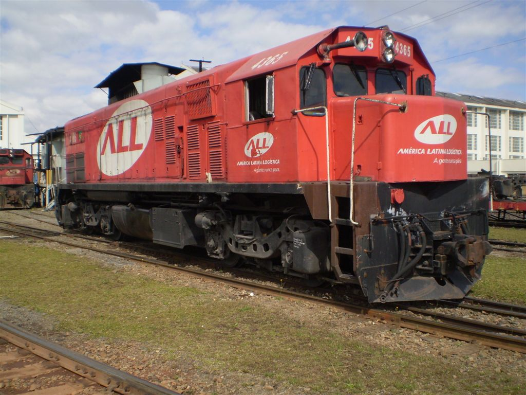 ALL GM G22U #4365 B-B Oficinas da ALL em Curitiba-PR-Brasil